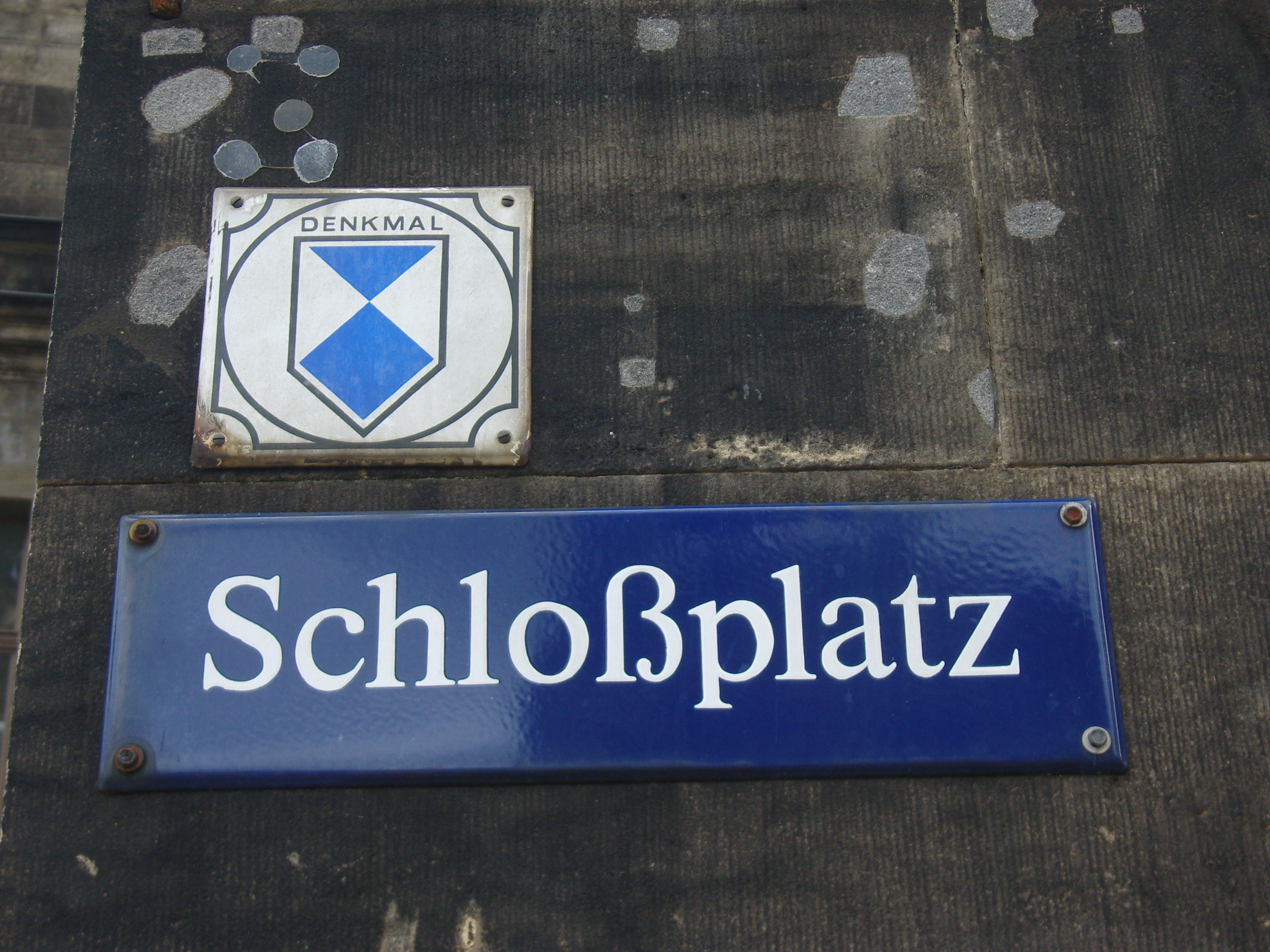 Denkmalschild am Ständehaus am Schloßplatz in Dresden